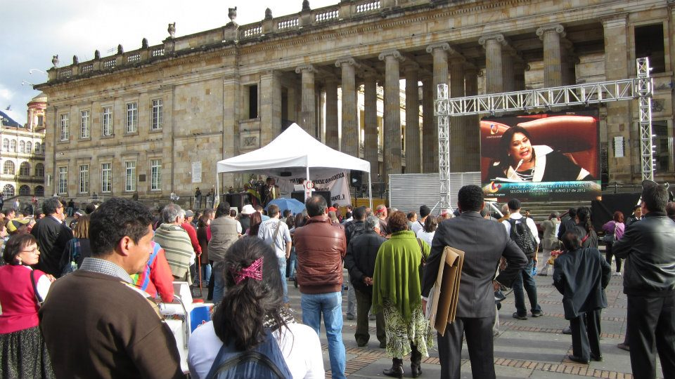 Plantón contra a la Reforma a la Justicia en Colombia de 2012 en la Plaza de Bolívar